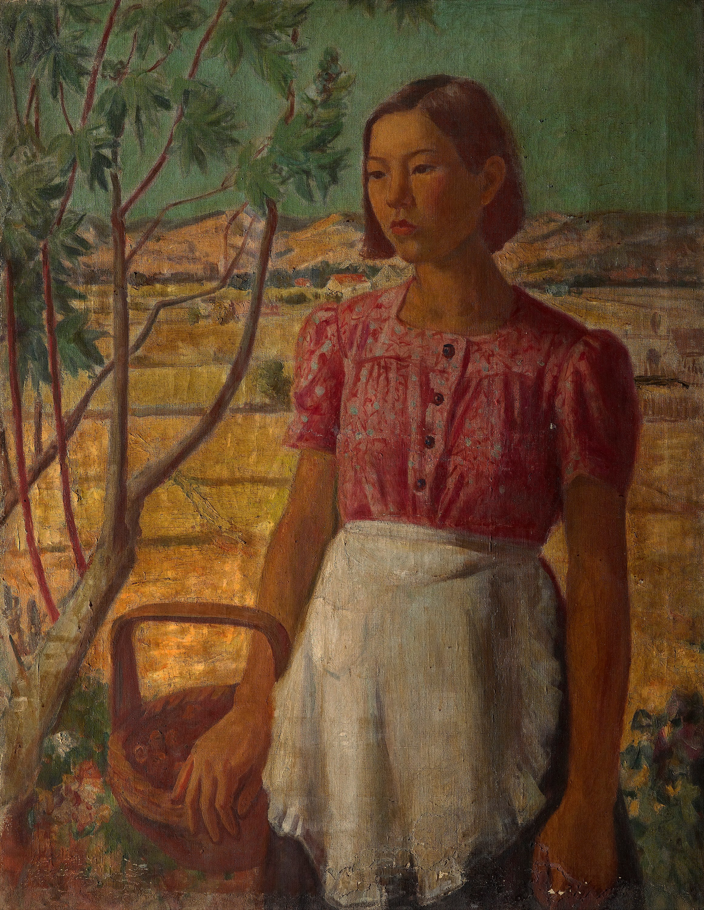 作品為第4回府展。李梅樹1941年《秋實》一作，構圖嚴謹、色彩厚實，農村少女的樸實神情與田園空曠的空間感相呼應，這些早期田園人物，在藝術評價上頗高。取景是由李梅樹舊家望向鶯歌方向，模特兒為林罔。畫面色調統一，風格類似後期印象派高更，強調人物實體感，給予人心靈上溫馨、樸拙之美，秋天感覺躍然於畫布，並透過田園少女的描繪呈現出濃郁風貌。